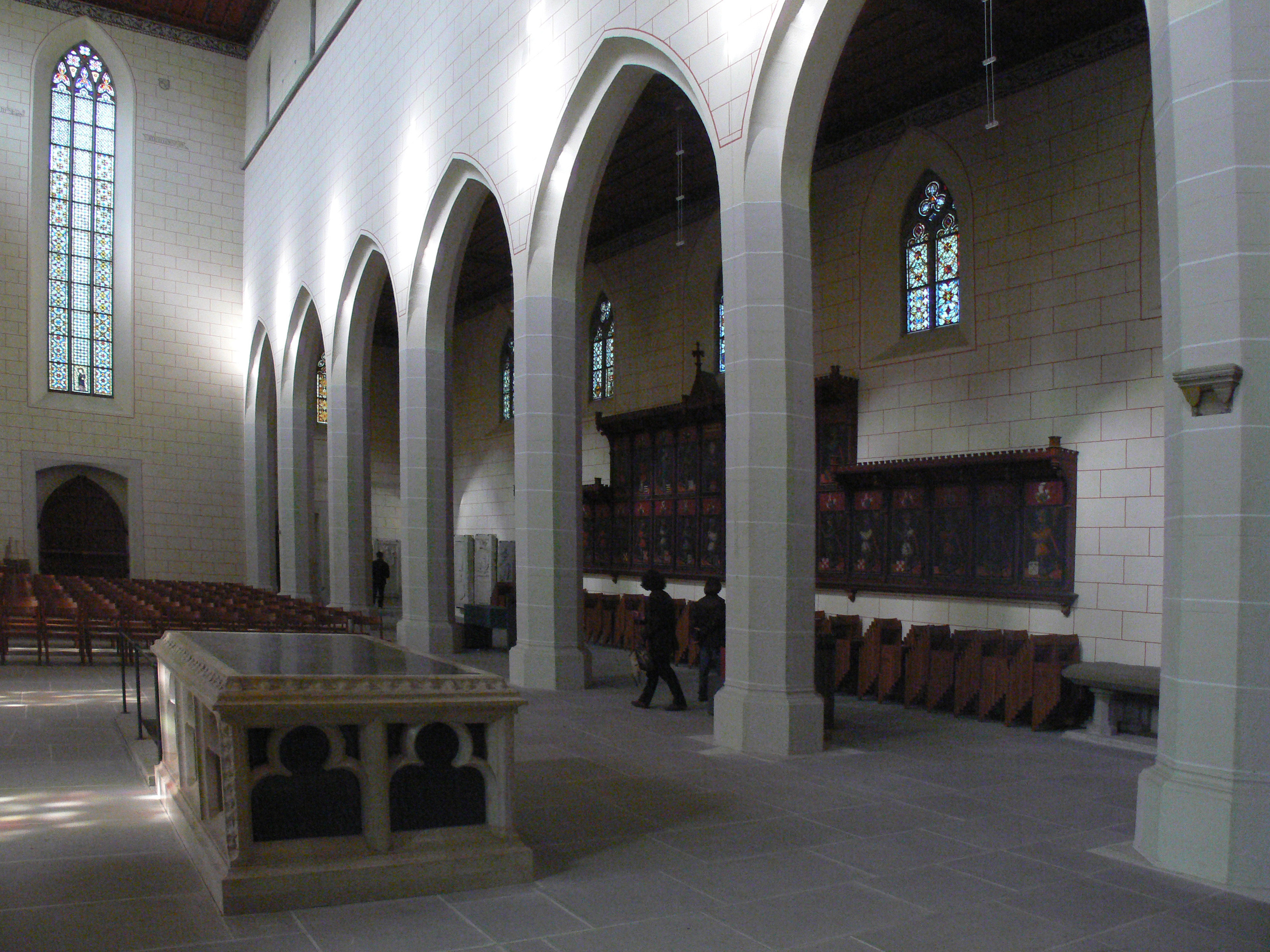 Windisch. Kirche des früheren Klosters Königsfelden.